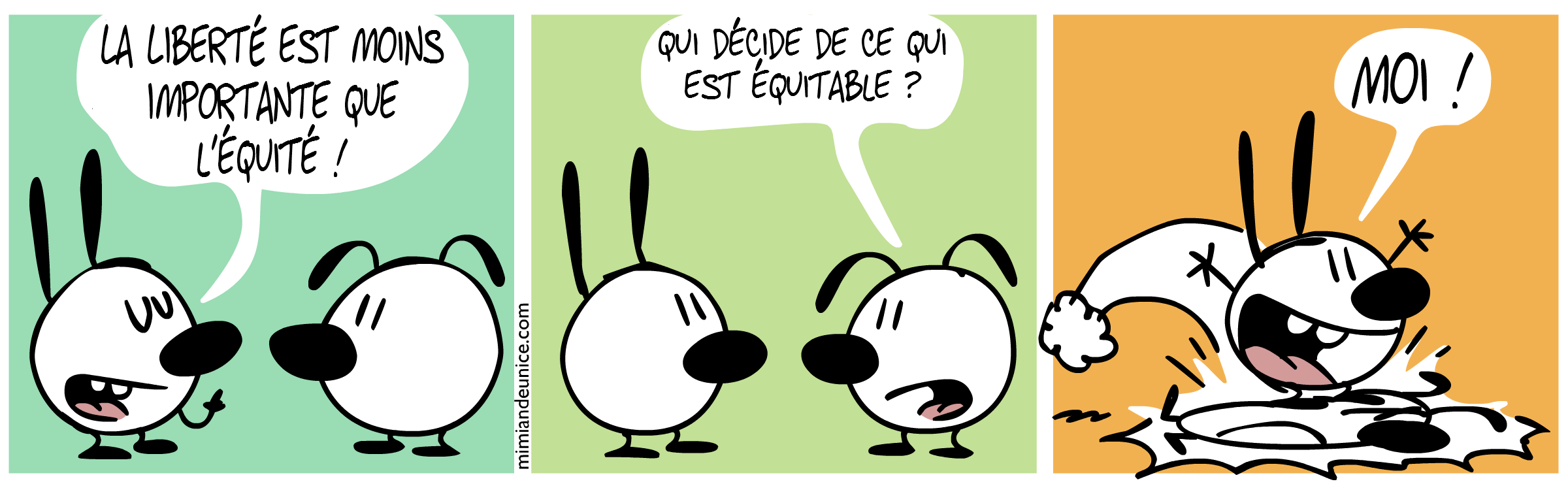 Mini & Eunice, traduction par Léna